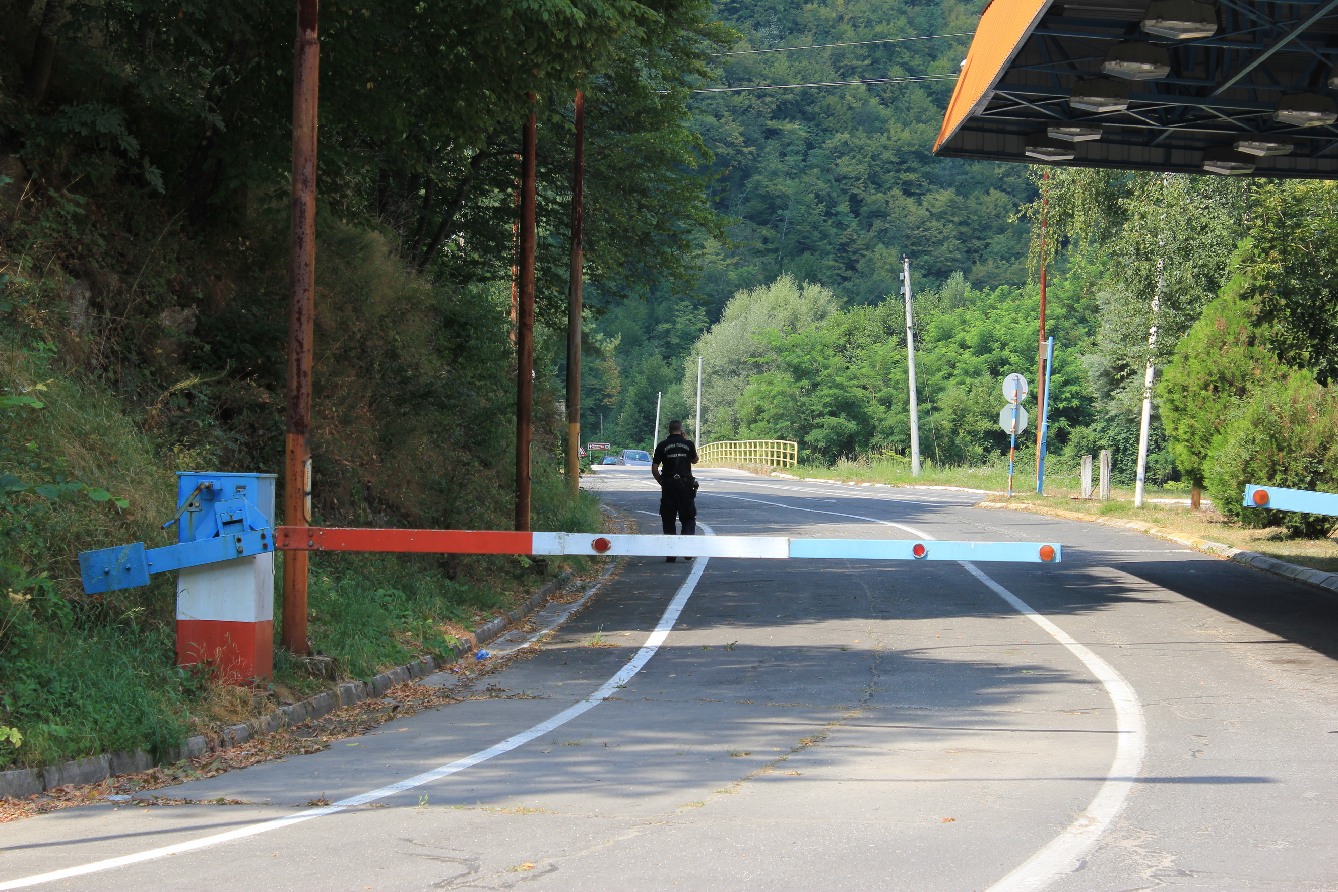 Hornjoserbsce: Hranica mjeze Serbiskej a Bołharskej blisko Bosilegrada.